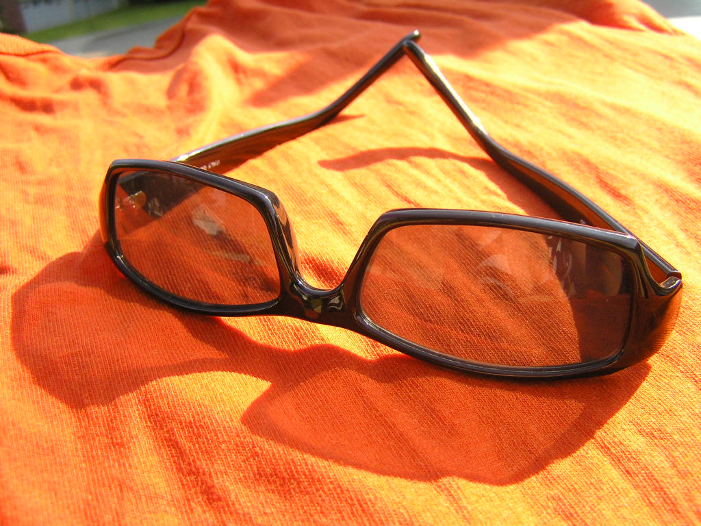 Sunglasses